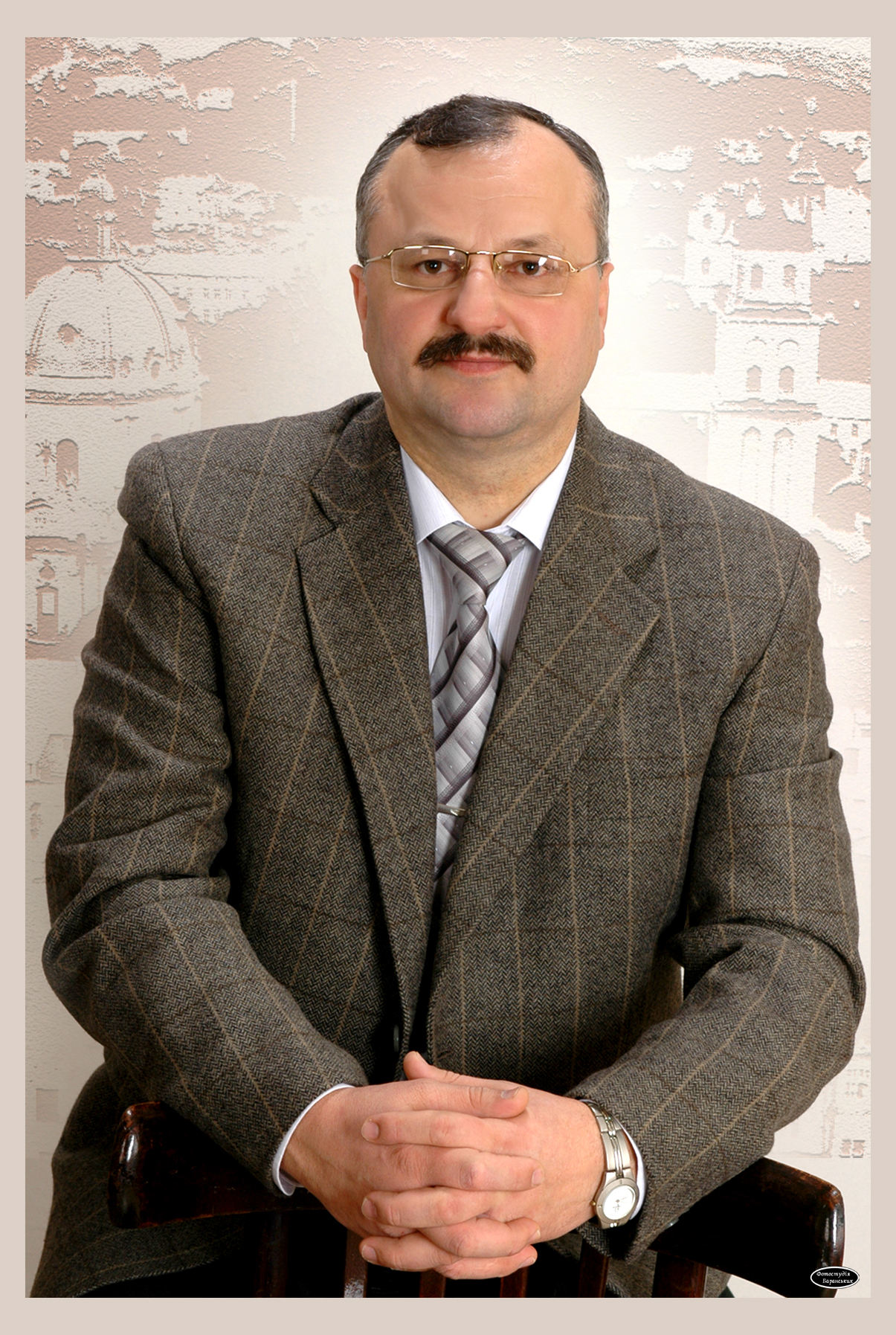 Олег Лазор